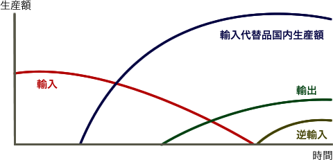 雁行形態論副次型のイメージ図